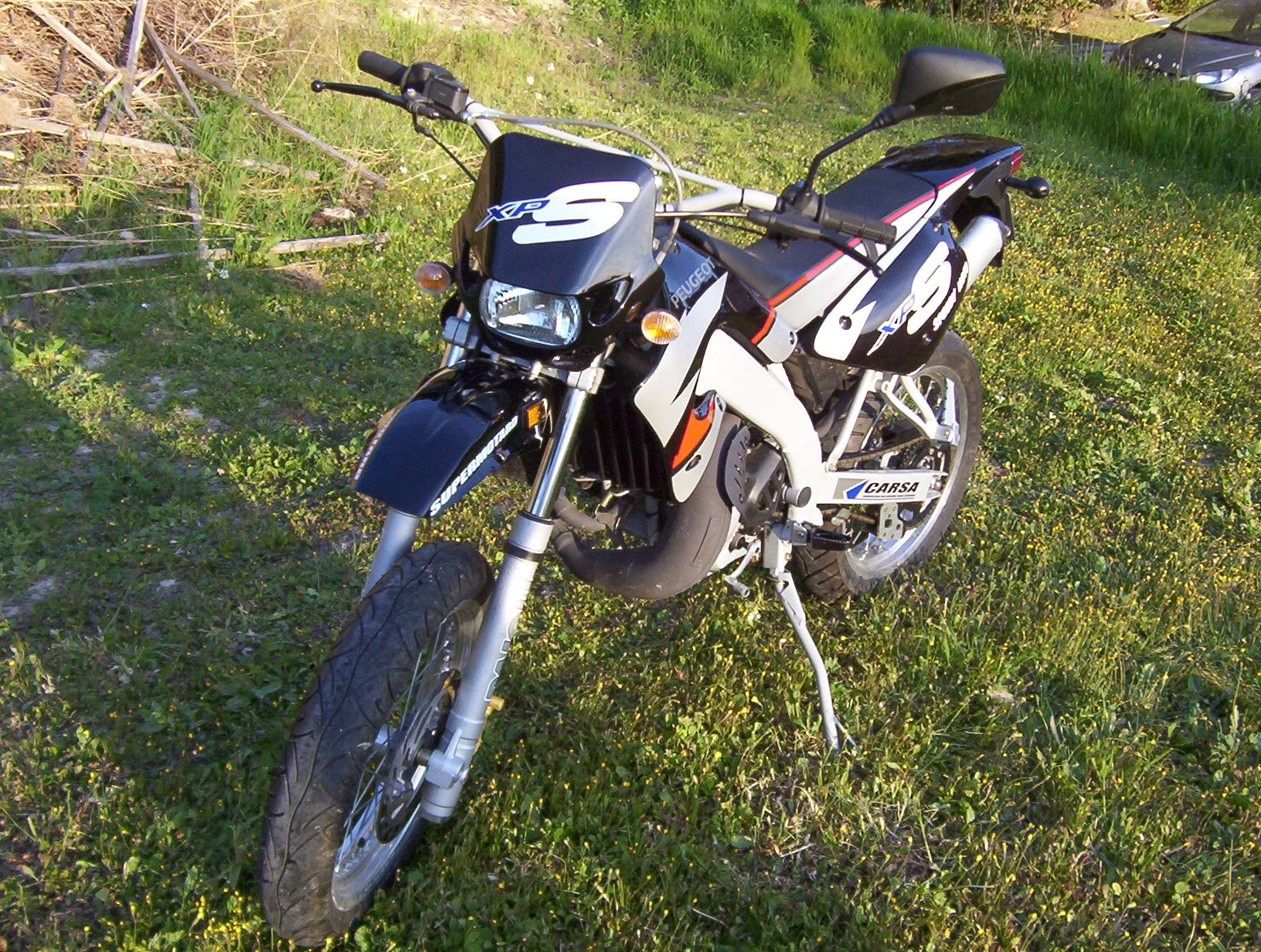 Photos d'un Peugeot XPS 50cc à moteur 6 vitesses.